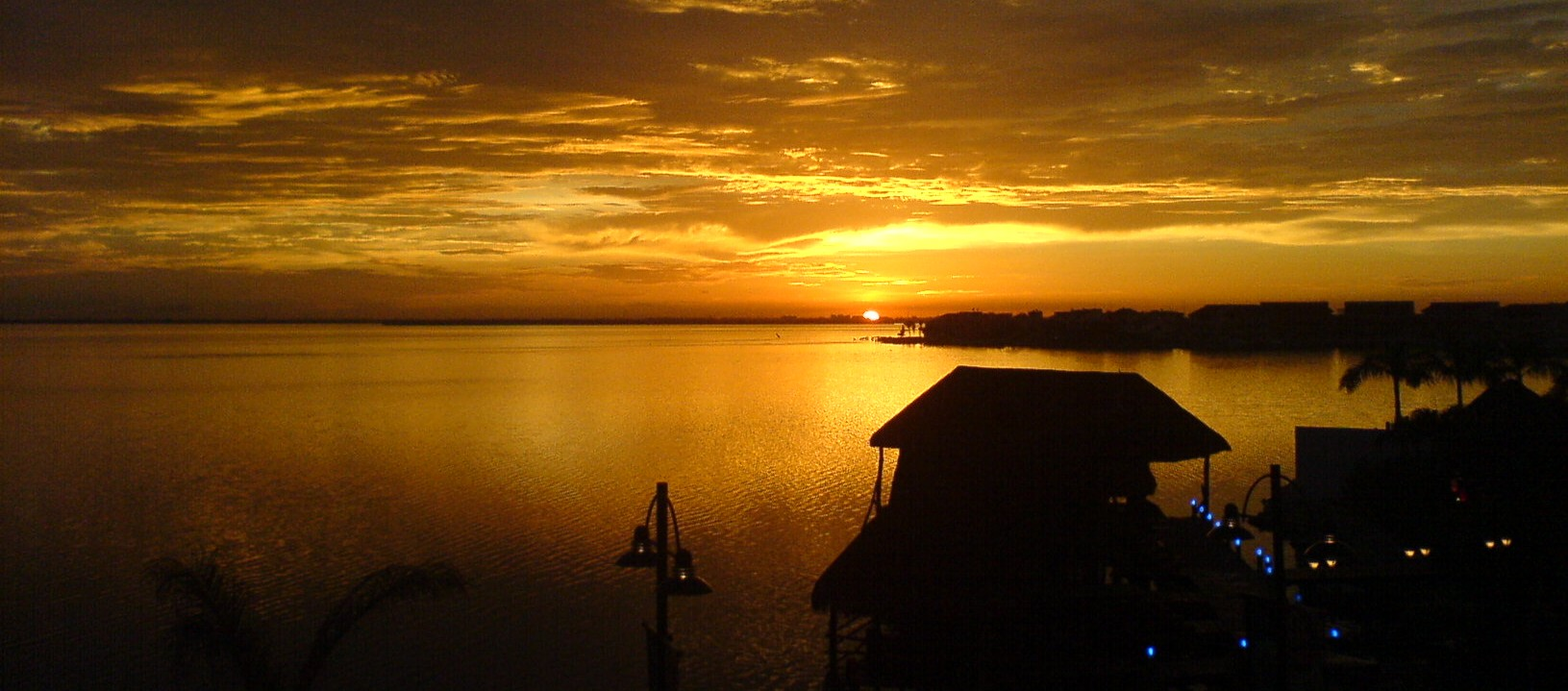 Atardecer en la laguna Nichupté.